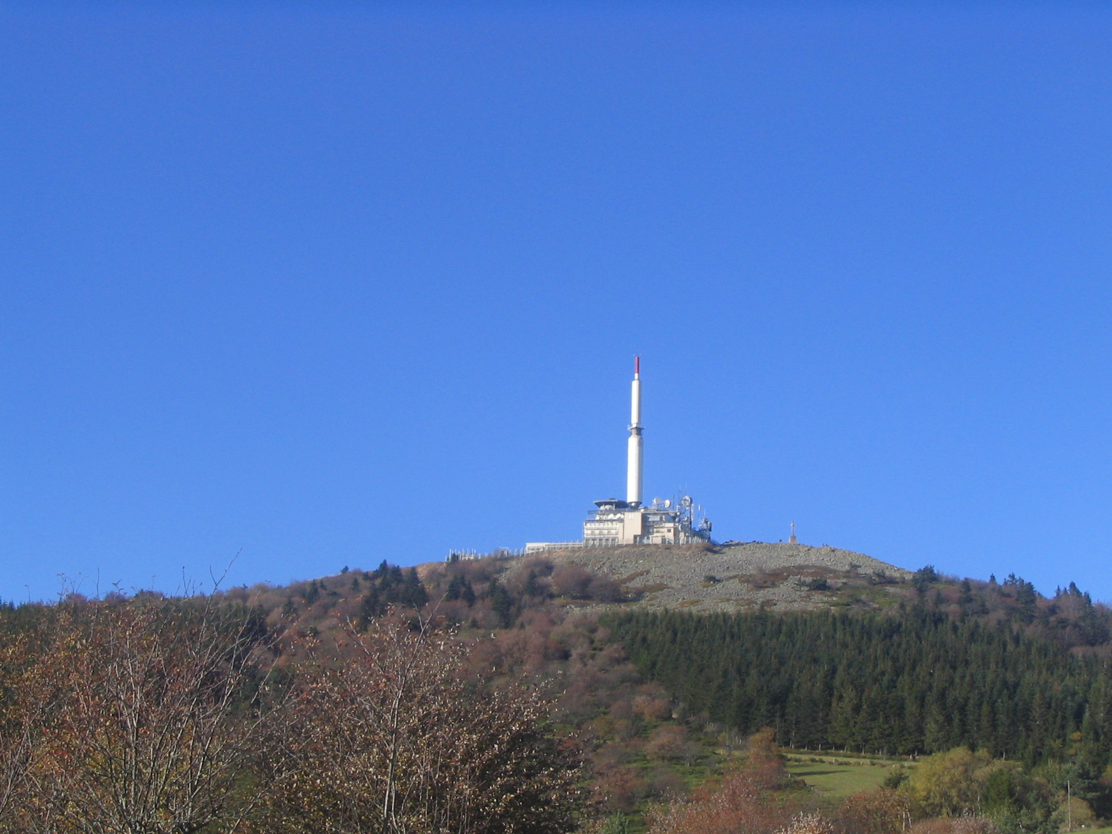 Dans le massif du Pilat, Crêt de l'Oeillon